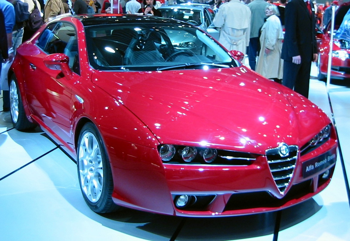 Alfa Romeo Brera auf AMI Leipzig 2005.